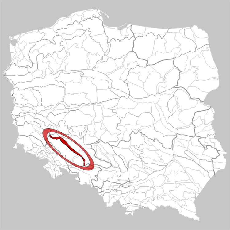 Physico-geographical regionalization of Poland Mezoregion 318.52 Wrocław Glacial Valley Regionalizacja fizycznogeograficzna Polski Mezoregion 318.52 Pradolina Wrocławska